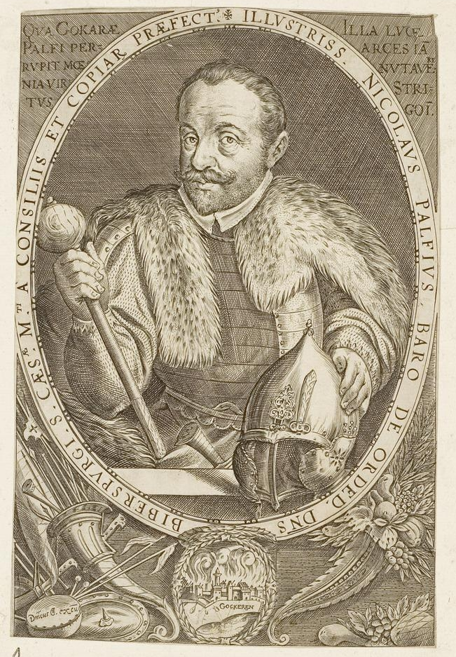 Grafik aus dem Klebeband Nr. 1 der Fürstlich Waldeckschen Hofbibliothek Arolsen Motiv: Nikolaus Pálffy von Erdöd (1552–1600), kaiserlicher Generalfeldmarschall GND: 138693498 ADB: Pálffy von Erdöd, Nikolaus Graf